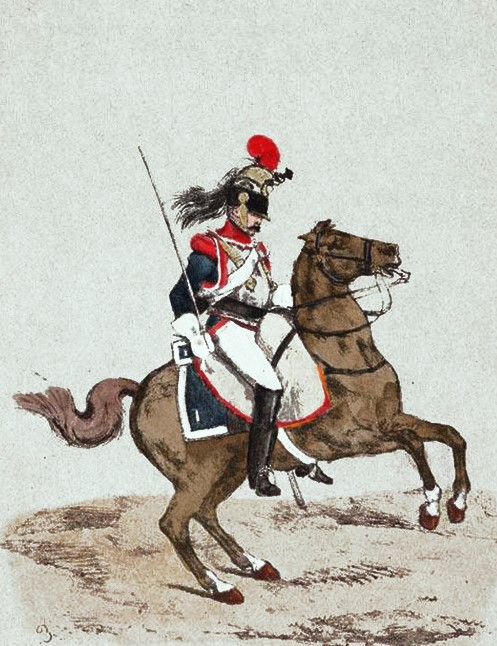 Cuirassier du 1er régiment en 1812.